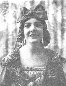 Fotografía de la cantante española Selica Pérez Carpio publicada en 1926 con motivo de su actuación en el Teatro Ruzafa de Valencia.